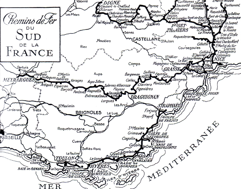 Plan de ligne de l'ancienne Compagnie des Chemins de Fer du Sud de la France